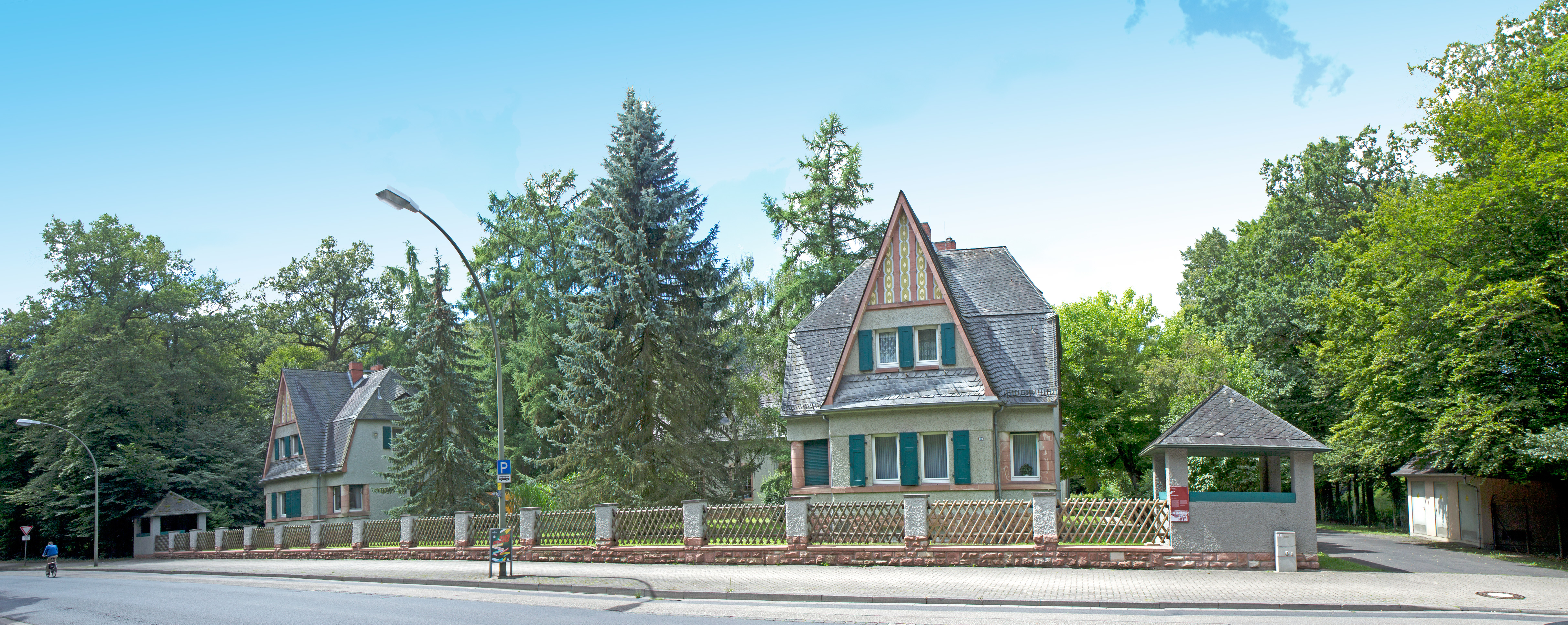 Wasserwerk III in Hanau-Kesselstadt (Hessen)